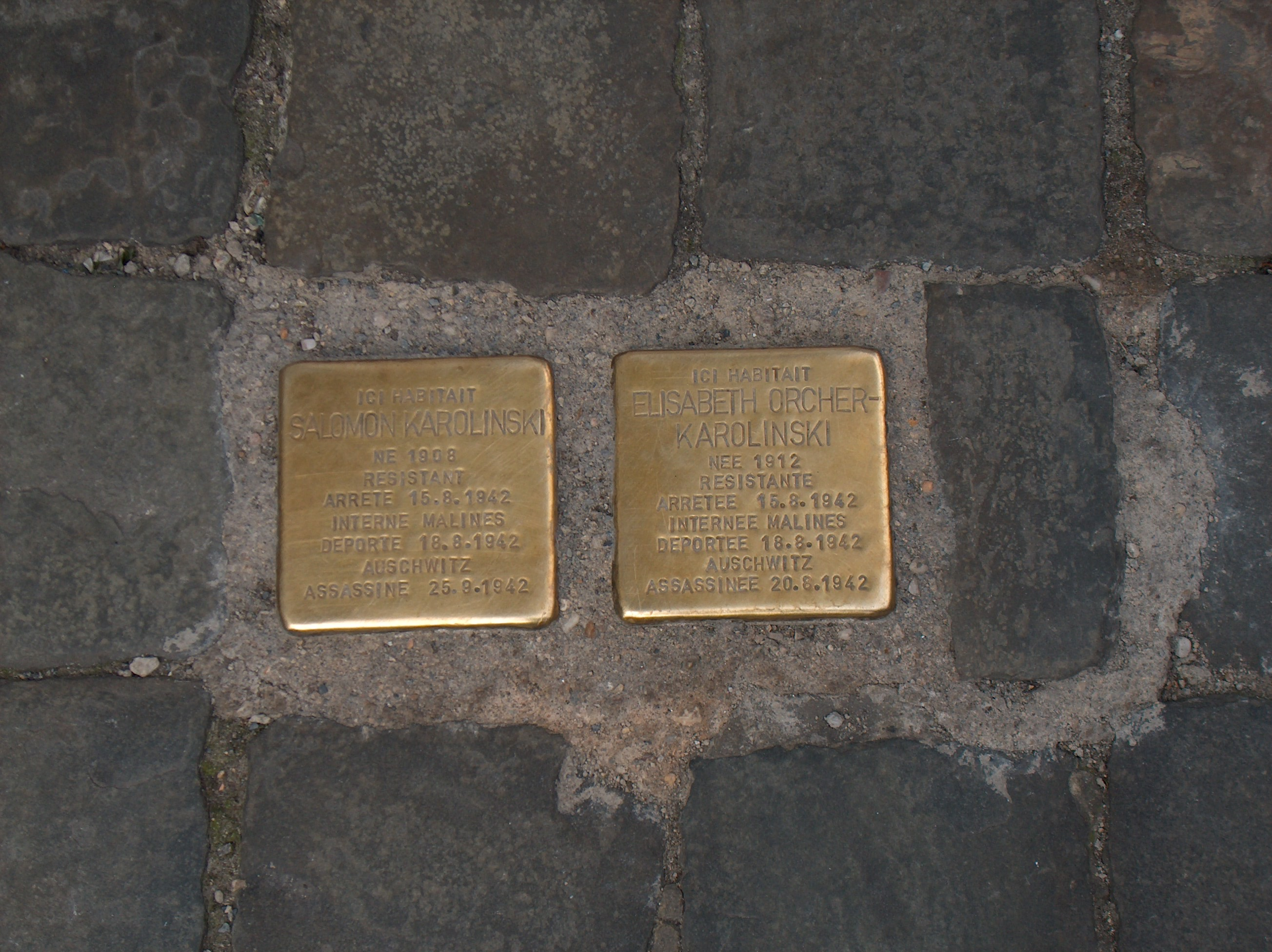 Les pavés de la mémoire 40 rue Vondel à Schaerbeek, Bruxelles, Belgique.